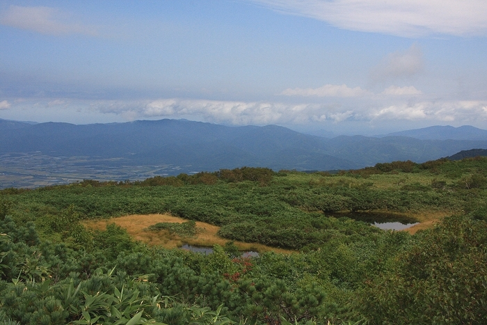 チセヌプチ山頂の沼